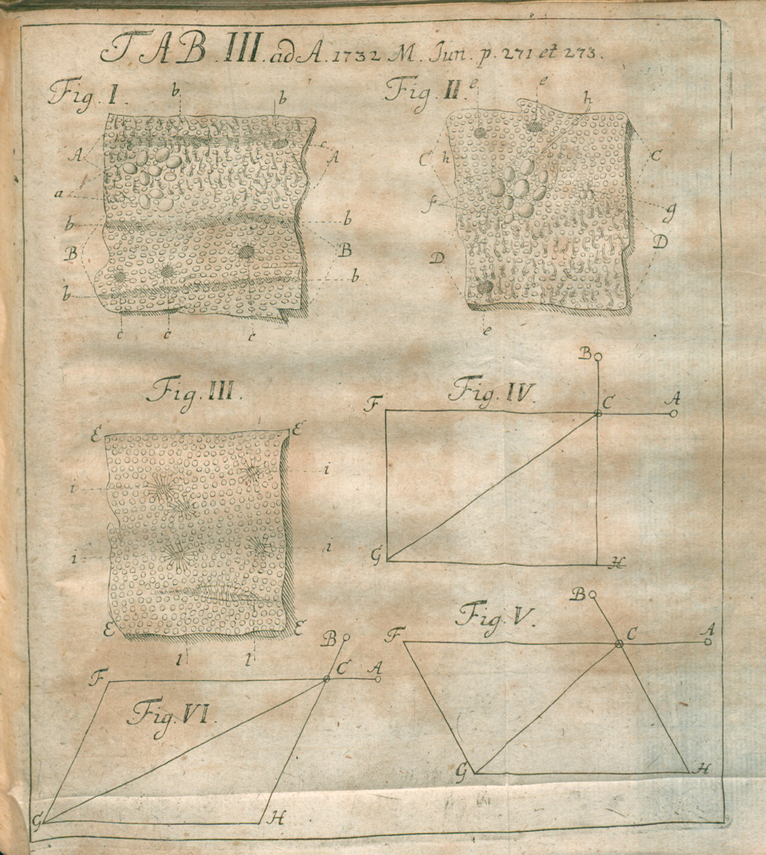 Illustration